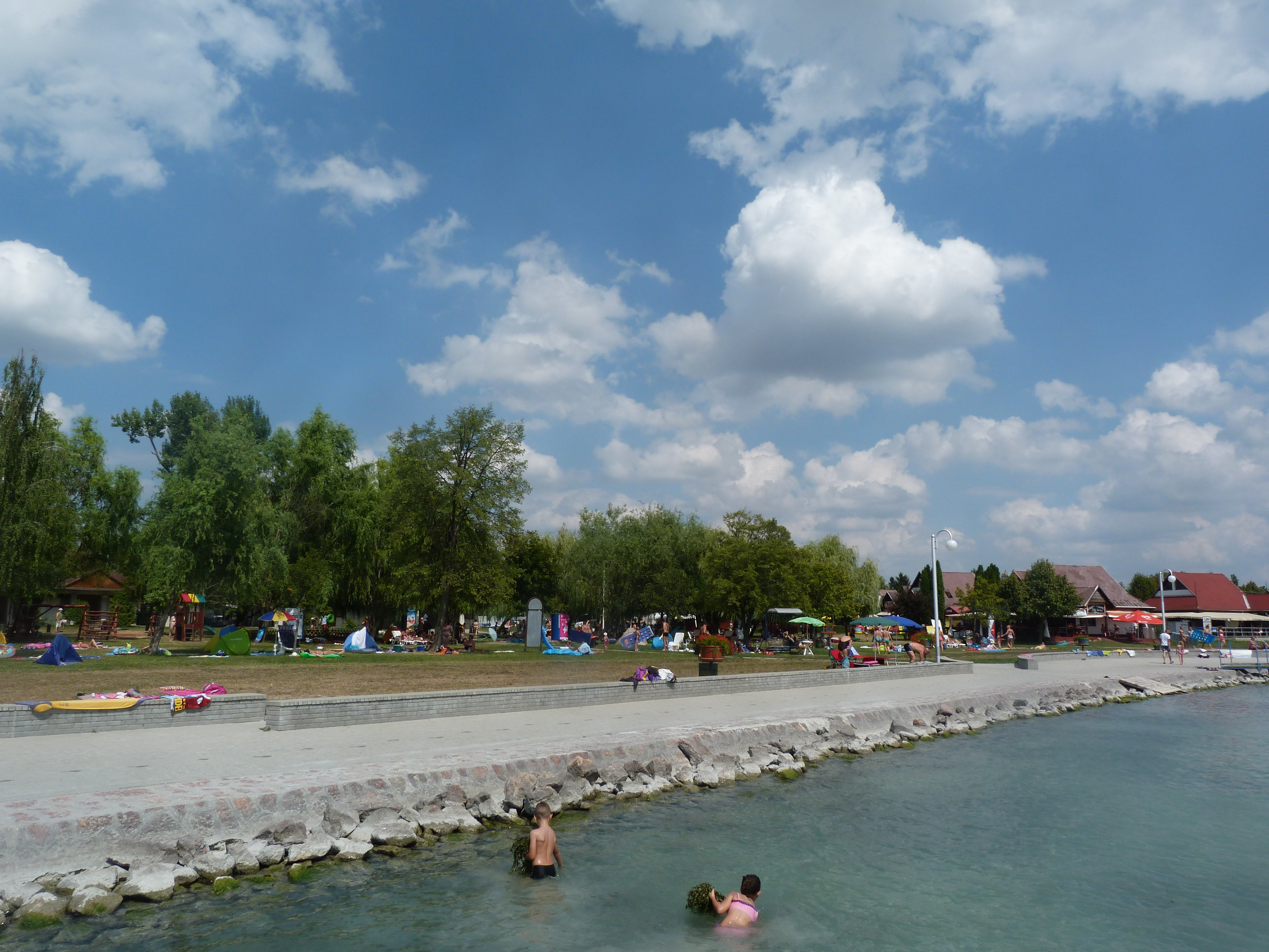 A felvétel 2015. augusztus 3-án hétfőn készült Balatonkenesén. Vak Bottyán strand. ©© Derzsi Elekes Andor, Budapest, 2015, A fénykép másolását és felhasználását a szerző ellenérték nélkül megengedi. Az engedély kiterjed a kereskedelmi célú hasznosításra is. Kéri azonban nevének feltüntetését a felhasználás során. A Metapolisz sorozat valamennyi képe és filmje Creative Commons alatti. kereskedelmi - for profit - célra is felhasználható. Ajánlott hivatkozás: Derzsi Elekes Andor: Metapolisz DVD line